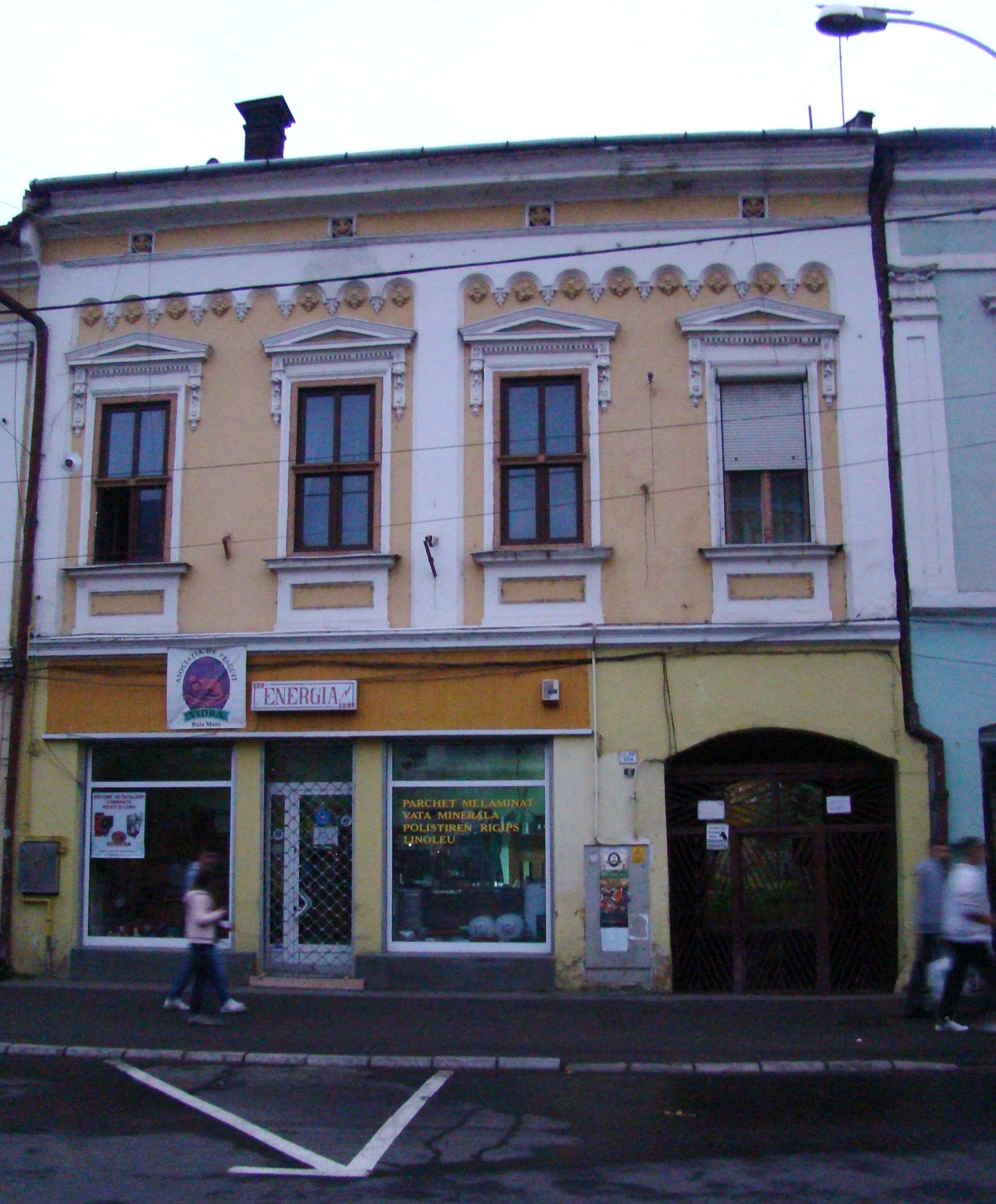 Casă, municipiul Sighetu Marmației, str.Bogdan Vodă 6